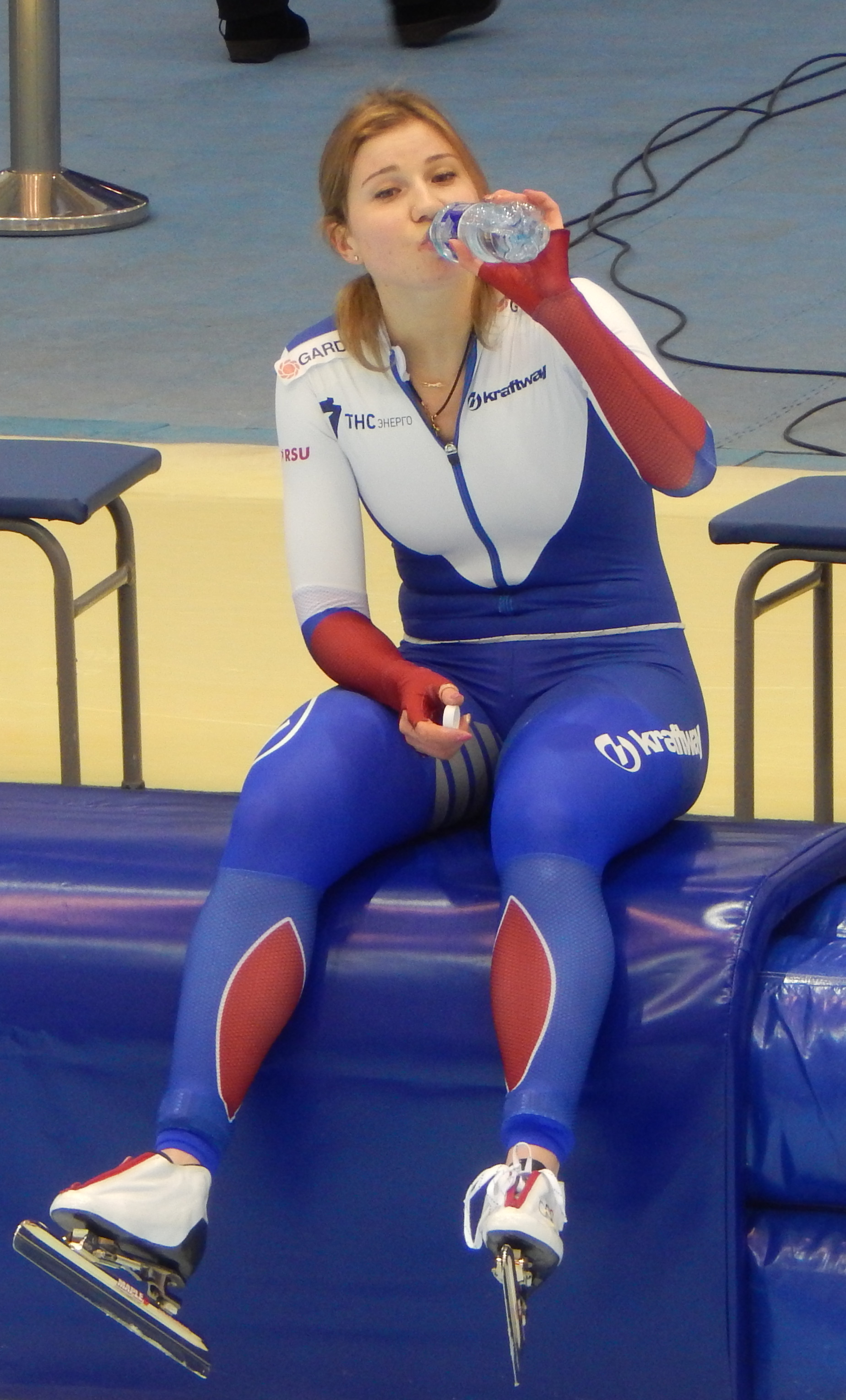 Чемпионат мира по конькобежному спорту 2016 в Коломне. Ольга Фаткулина после забега на 1000 метров у женщин